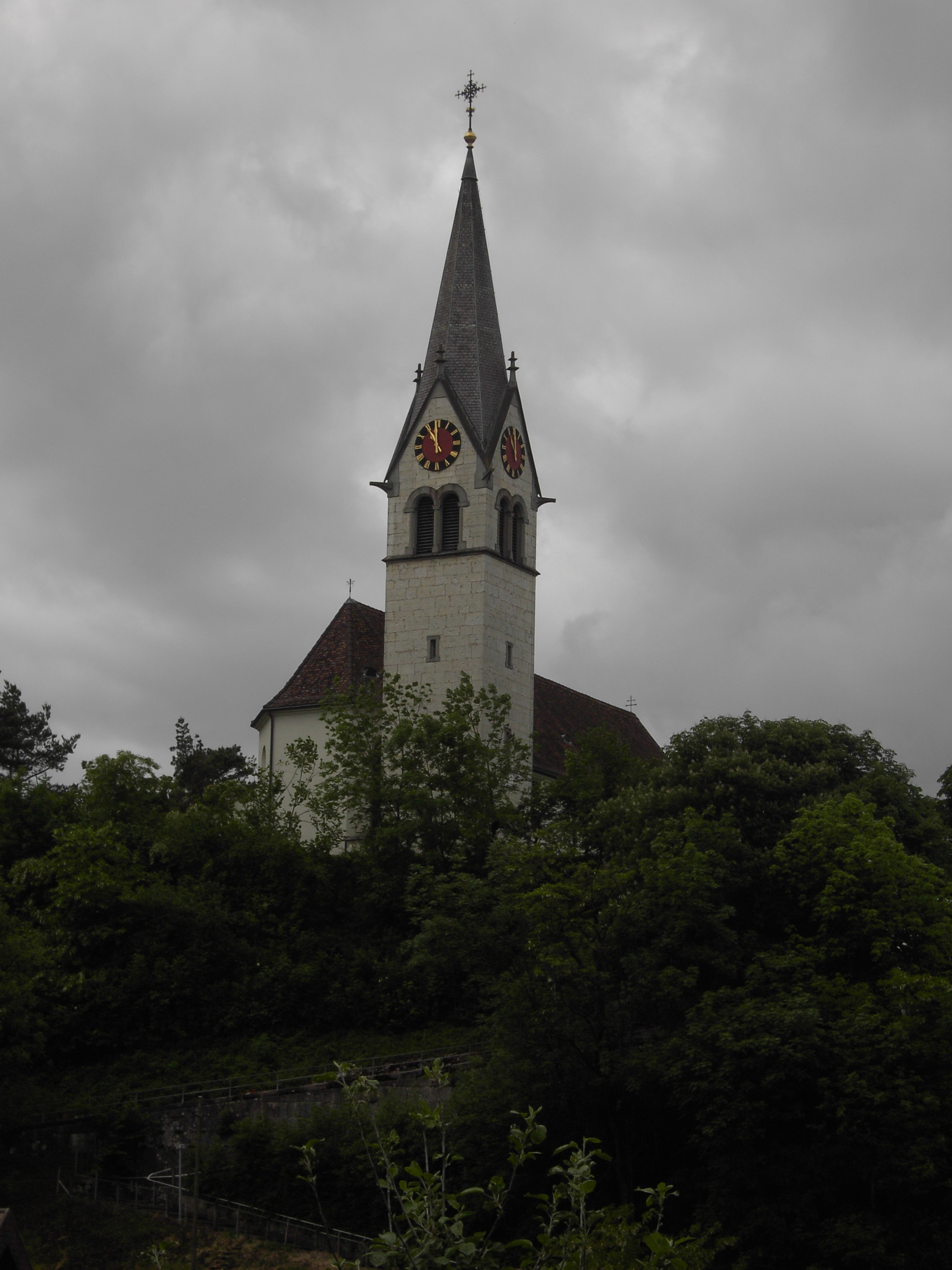 Würenlingen AG, Switzerland, roman-cath. Church